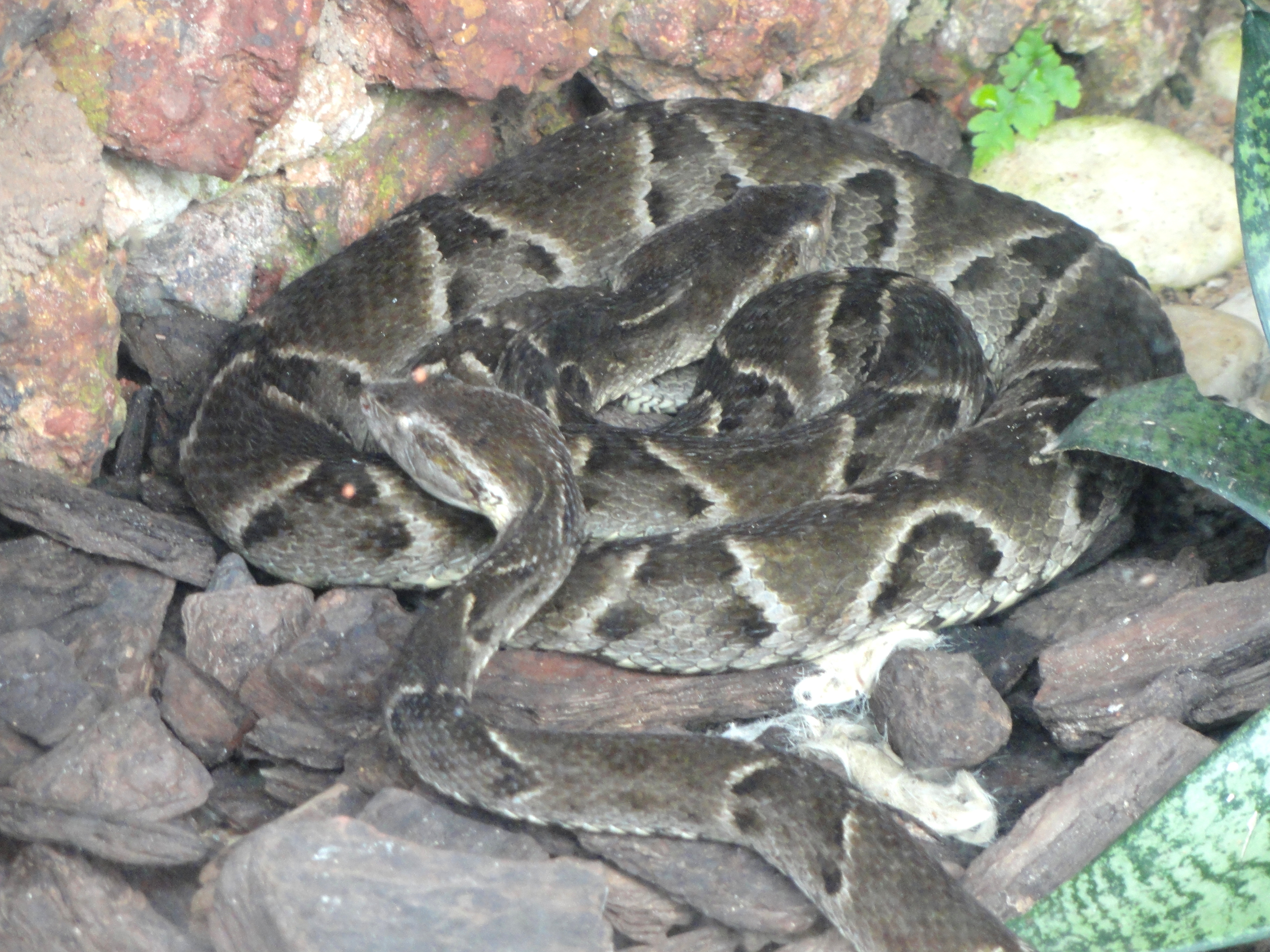 Jardim Zoológico de Brasília, Brasília, Brazil.